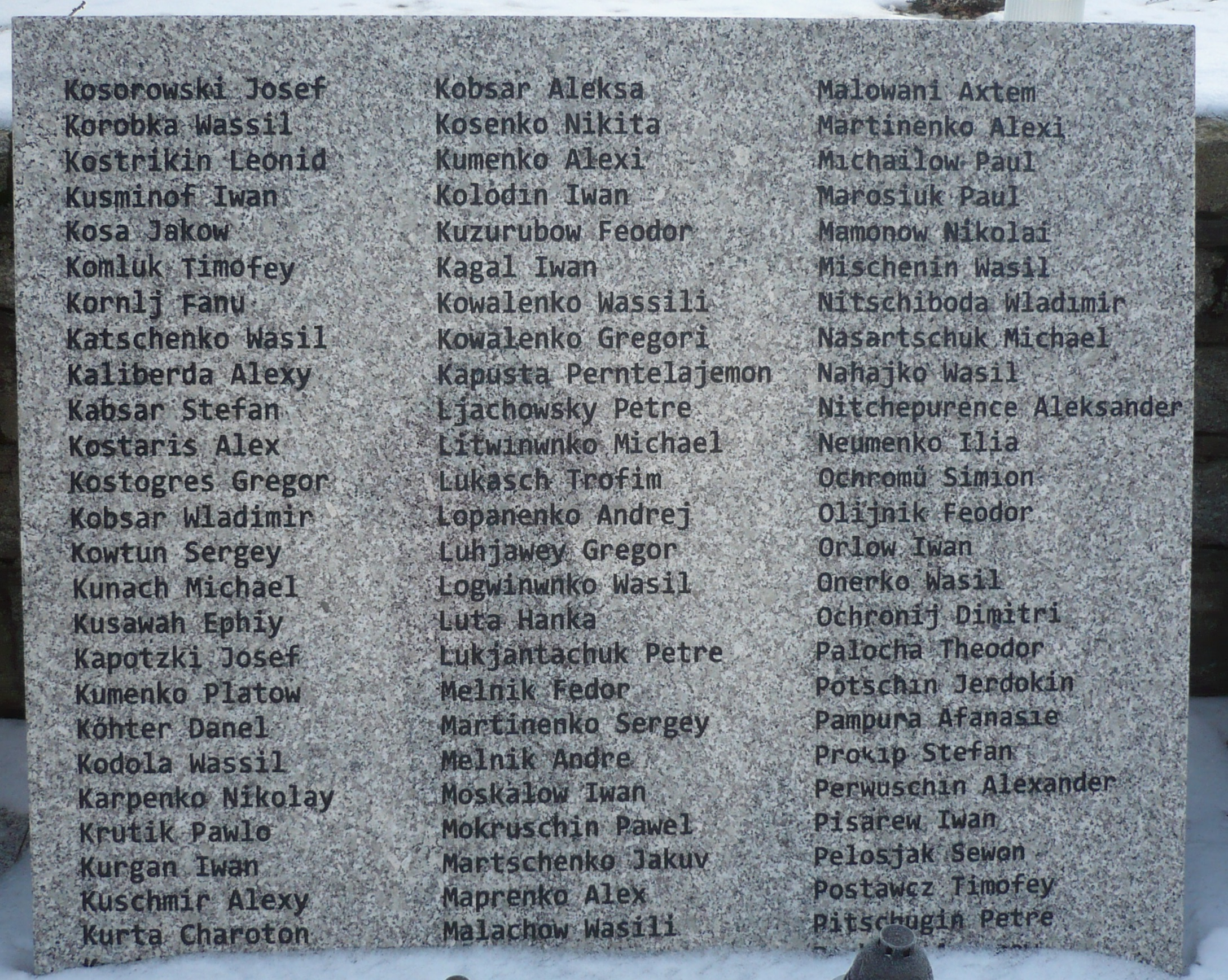 Walim. Cmentarz